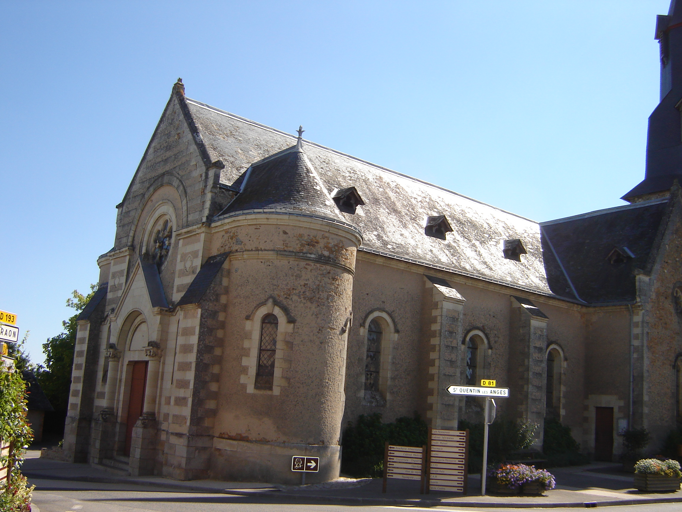 église de Châtelais photo personnelle mamounette49